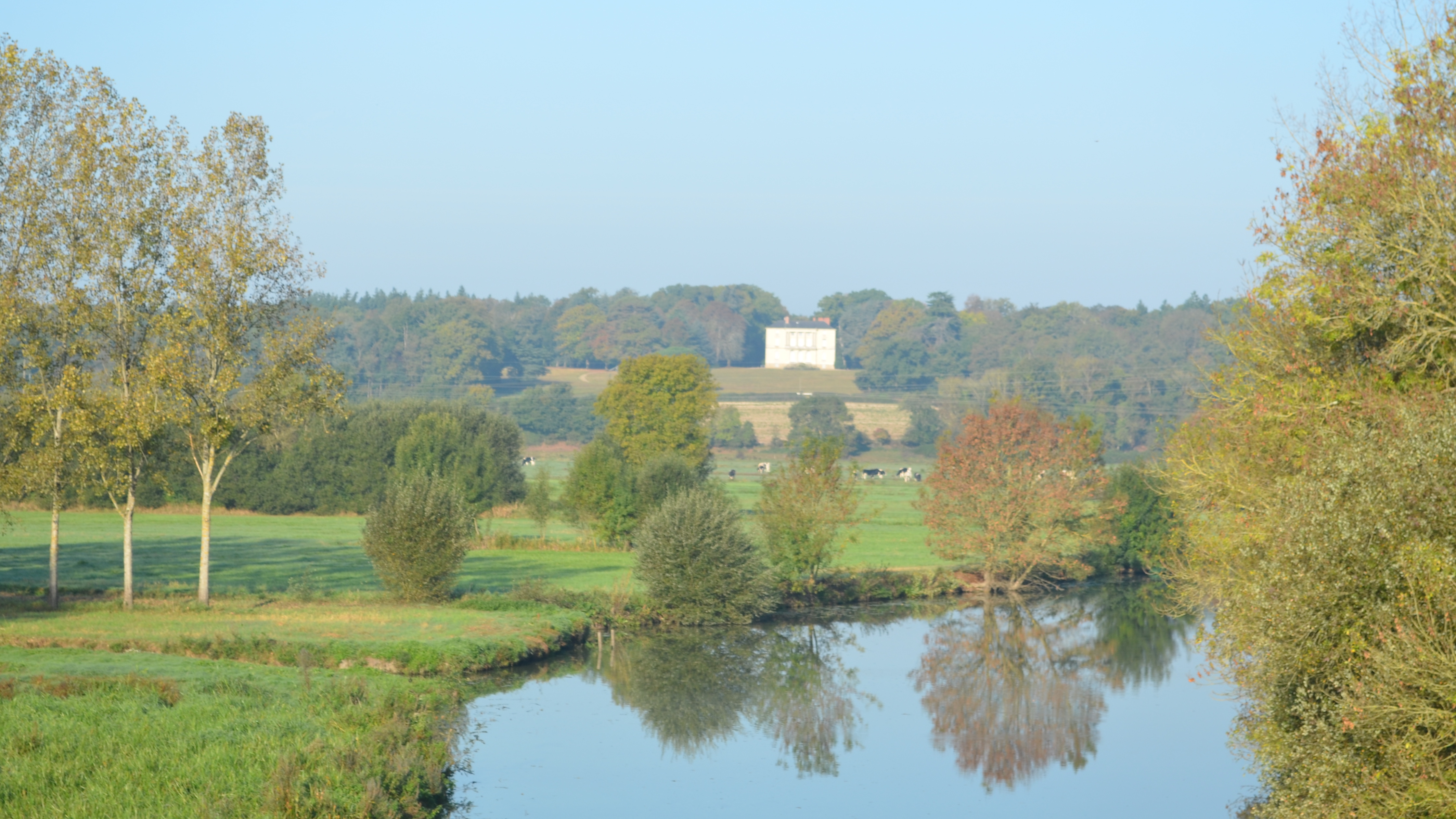 Château de Granville - Port-Saint-Père (Loire-Atlantique)